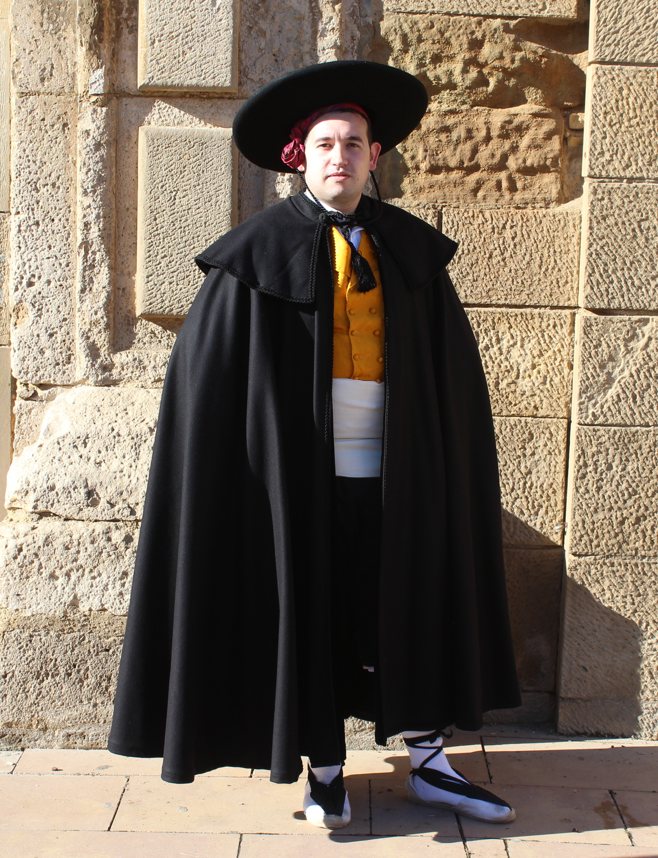 El Día de la Faldeta se visten de antaño, aquí podemos ver un hombre que luce indumentaria aragonesa. Este traje se solía usar para las ocasiones grandes, especialmente para el día de tu propia boda. This is a photography of a Folklore festival in Spain (Wikidata id Q20014639).